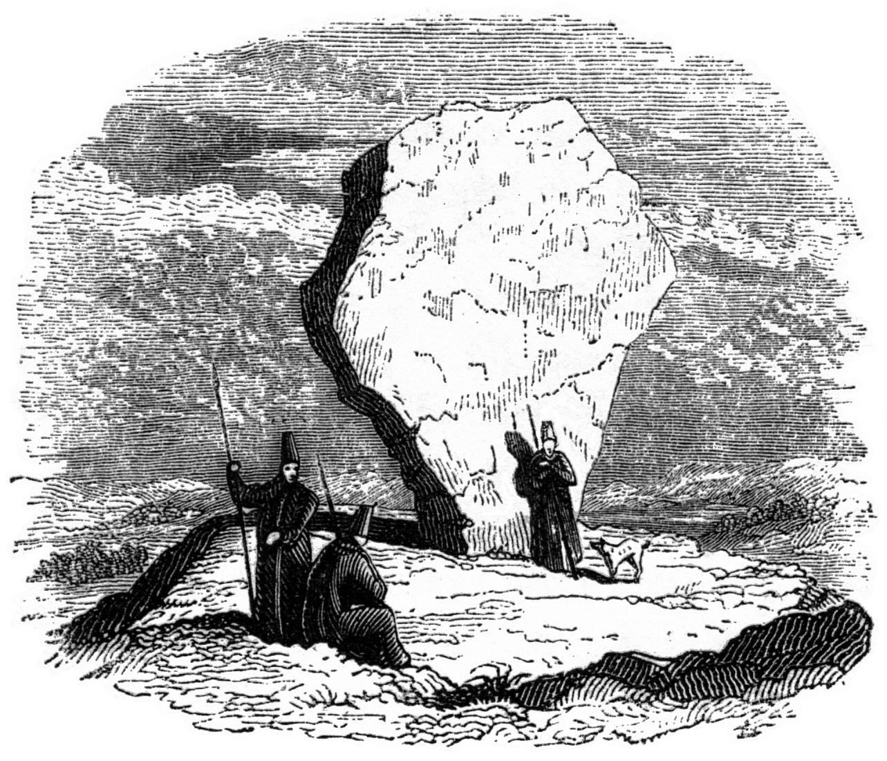 Druidical stone in Persia.